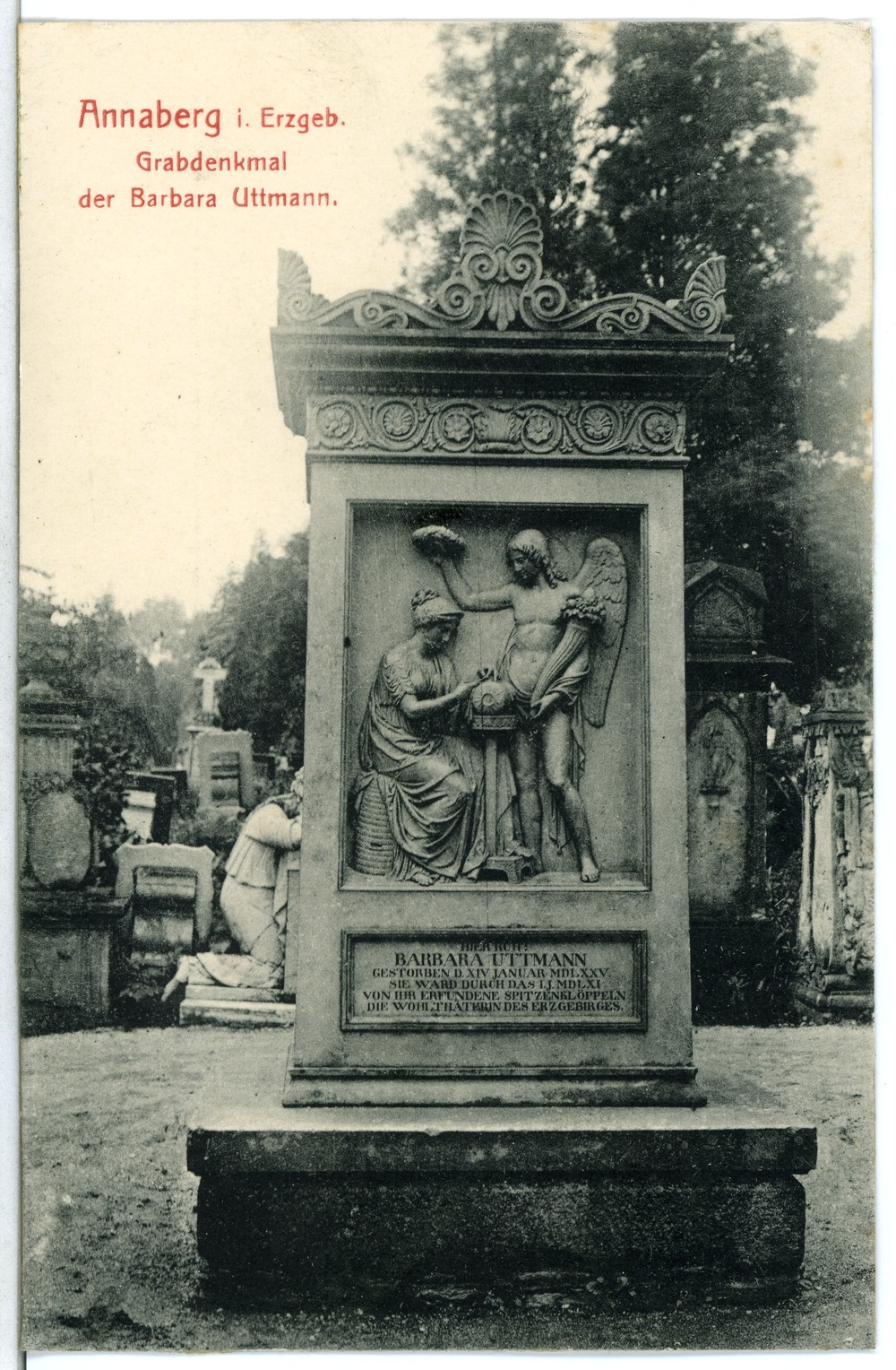 Annaberg; Grabdenkmal für Barbara Uthmann (1514-1575) auf dem Alten Friedhof in Annaberg-Buchholz von Franz Pettrich (1834). This postcard is from publisher Brück & Sohn in Meißen ( postcard has a unique number 12996 and is available in a higher resolution at the publisher. This images was uploaded in a cooperation project between Wikipedians and the publisher.